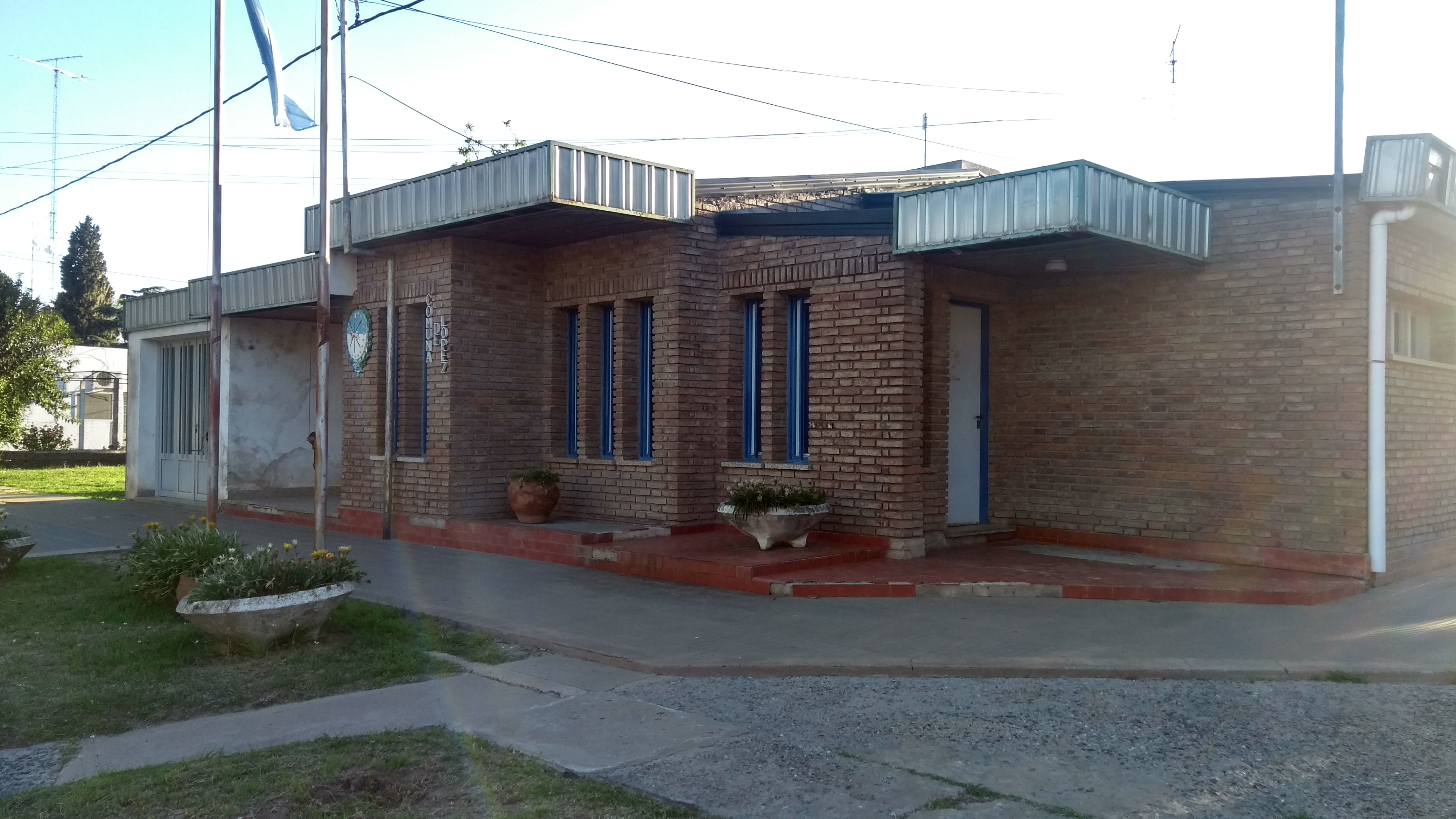 Edificio comunal de la localidad de López. En él también funciona el juzgado de faltas.